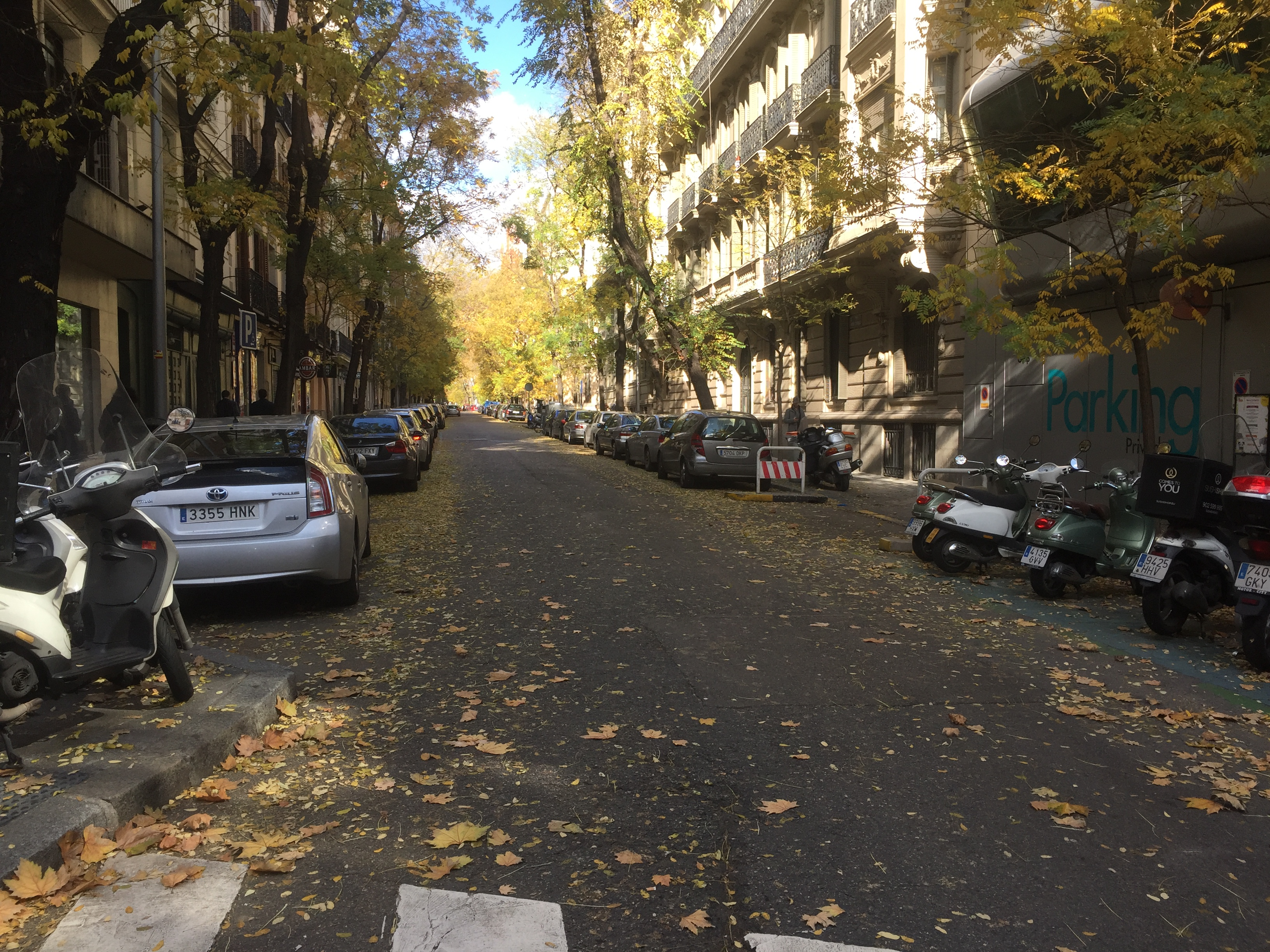 Calle del Monte Esquinza, Madrid. Foto tomada desde la calle Génova en otoño.